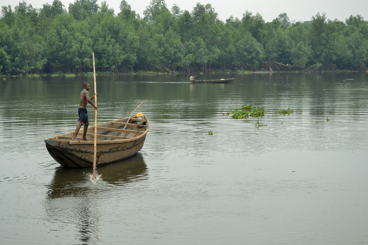 Une vue sur le wouri avec la navette des piroguiers à la recherche du sable pour certains ou du poisson pour d'autres.